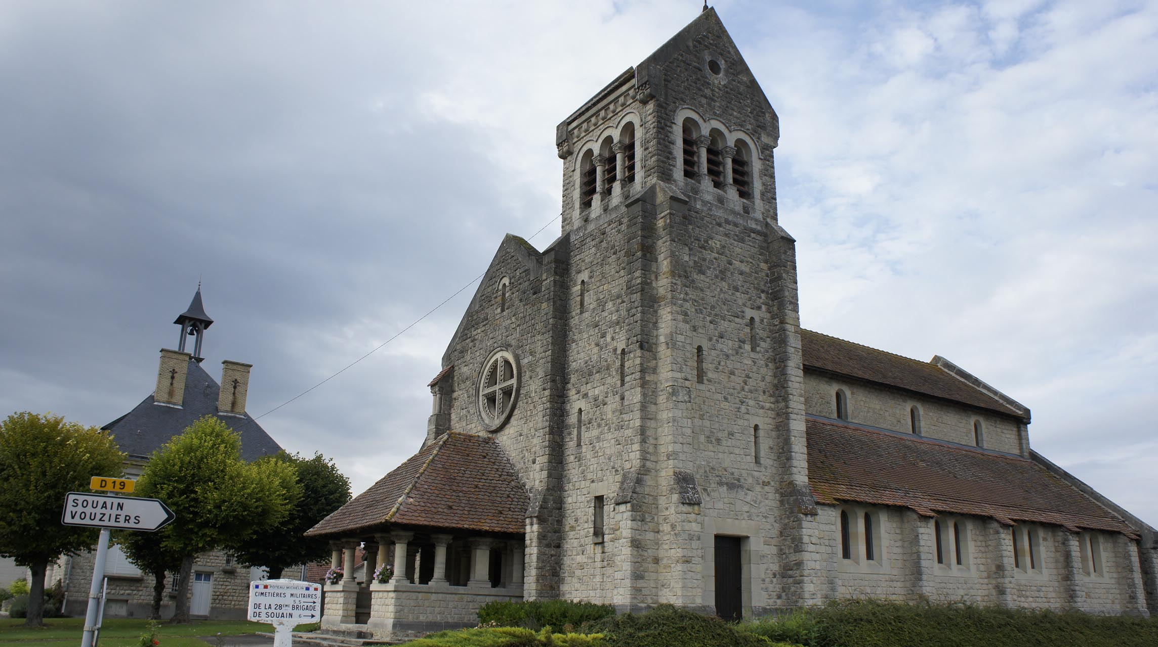 Église et mairie de st-Hilaire le grand.